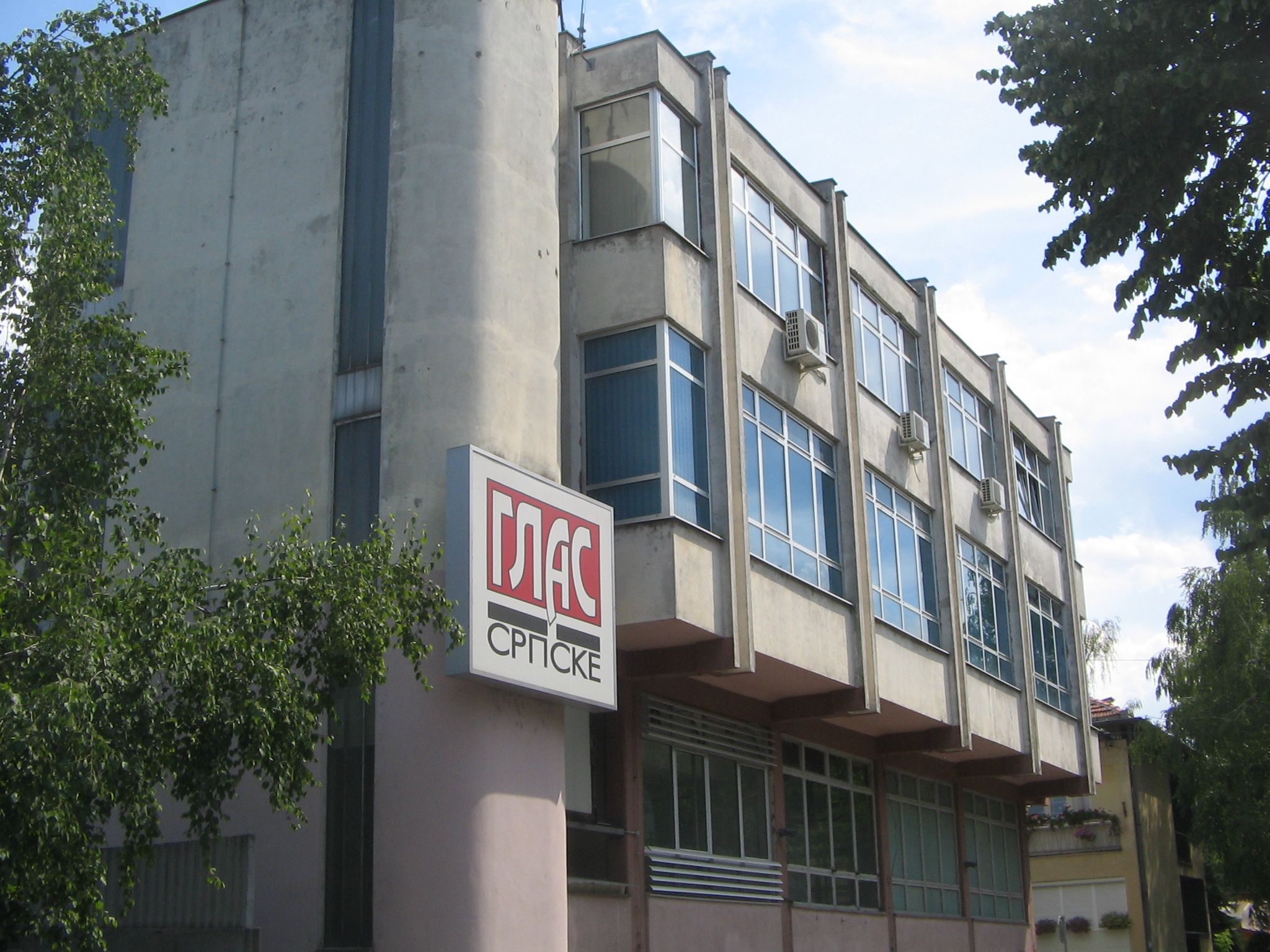 Zgrada_Glasa_Srpske